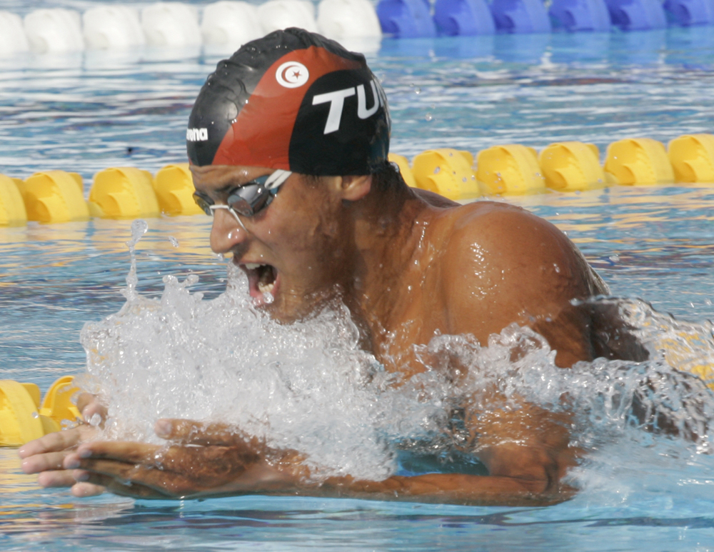 Photo of Oussama Mellouli given by him. Here the Email that I sent to him and his response : Salut Ous, Je suis administrateur de Wikipedia et nous recherchons des photos libres de droits de vous pour illustrer les articles vous concernant dans Wikipedia ( et Merci d'avance Cordialement, Kaïs Turki -- Bonjour Kais, Merci pour s'etre interesse a moi. Voila quelques photos que vous pouvez mettre sur votre site. Ous Mellouli